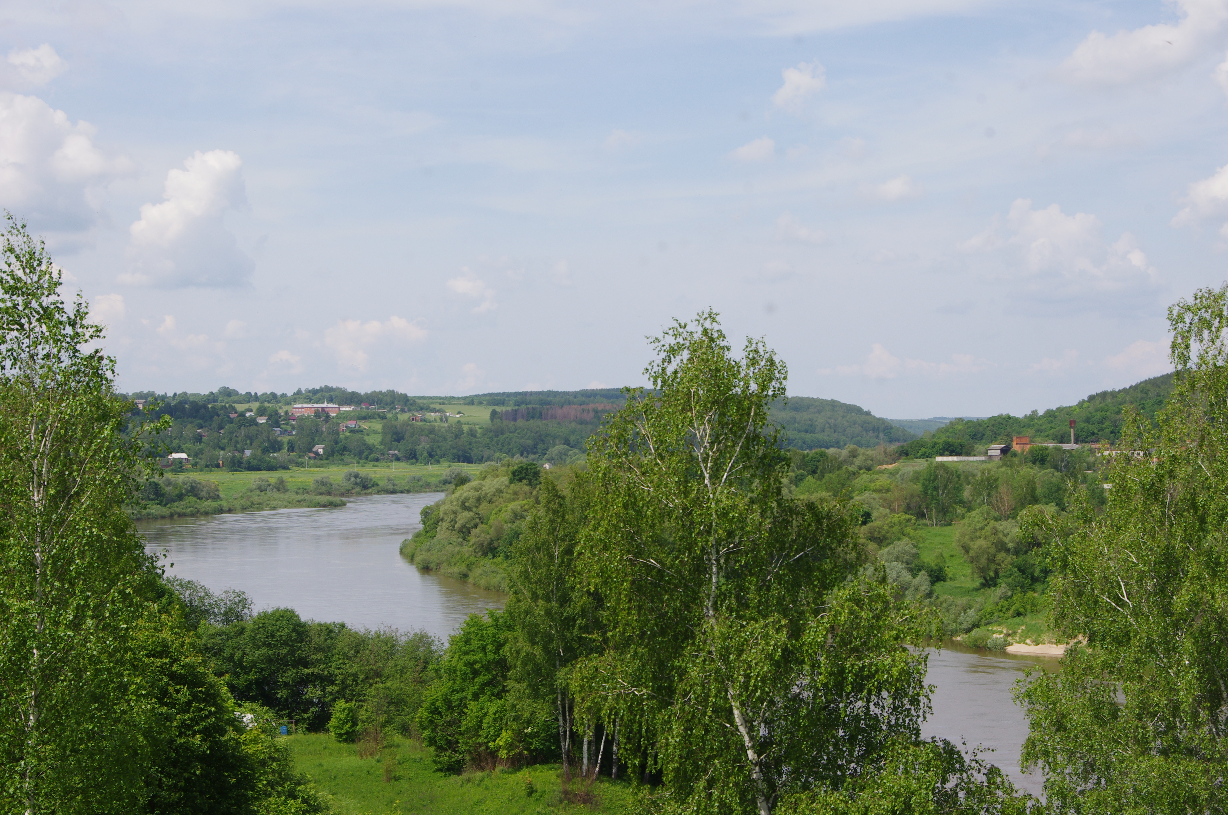 Ferzikovsky District, Kaluga Oblast, Russia